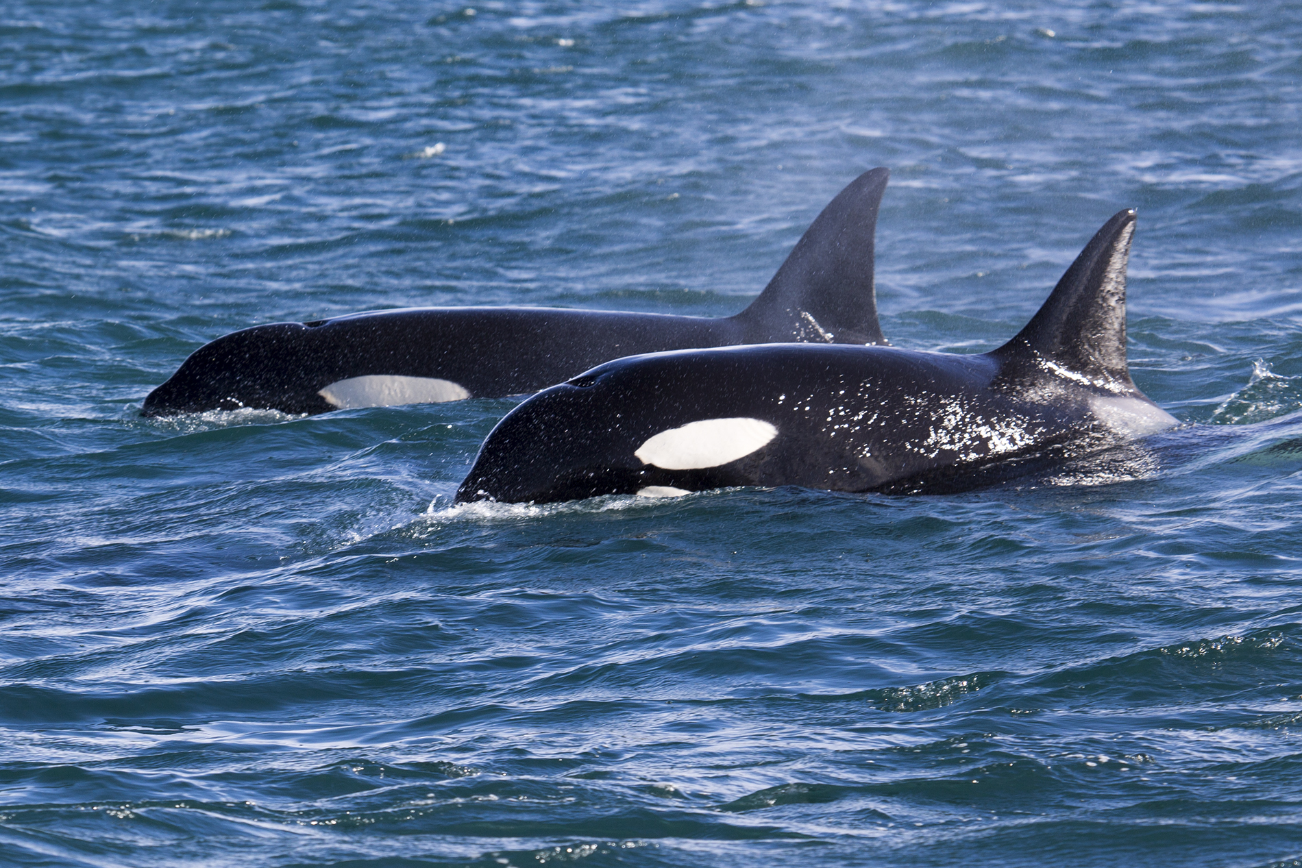 UK5A5006